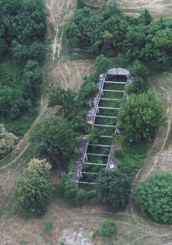 Görgeteg, Hungary, aerialphotography